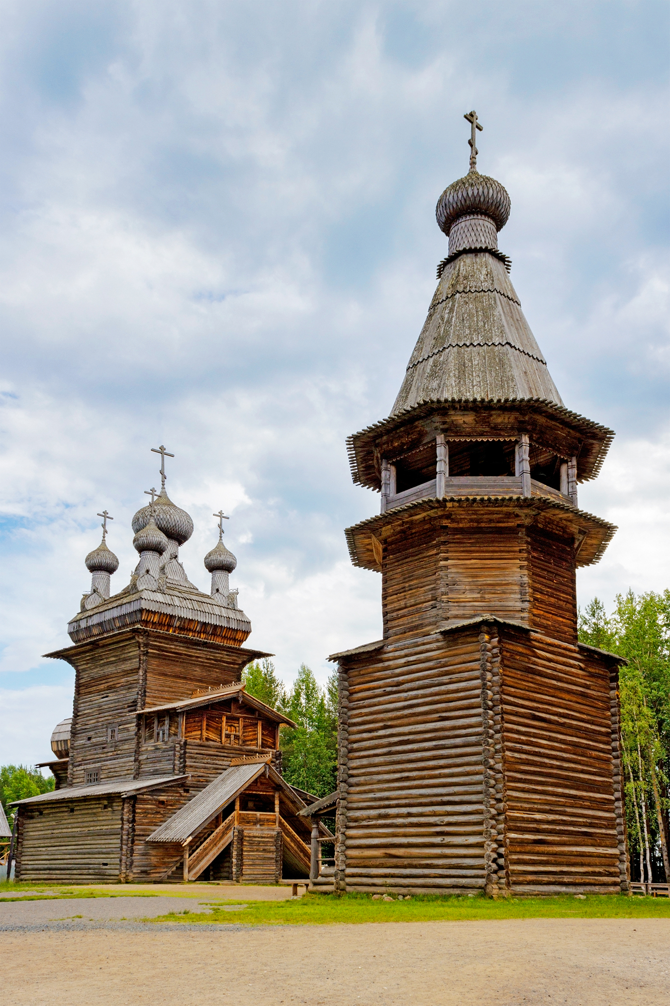 Колокольня: Малые Корелы, Приморский район, Архангельская область